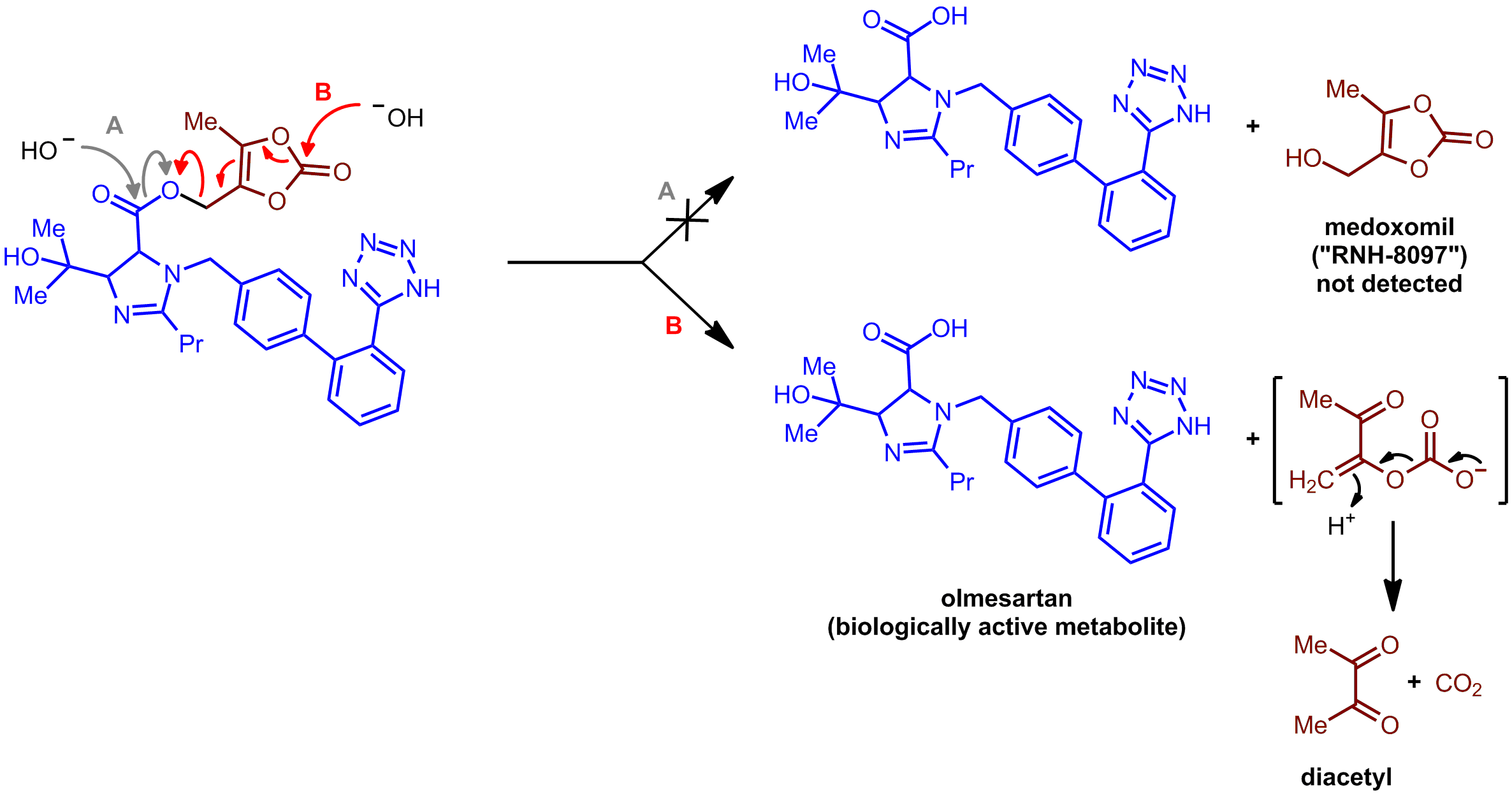 Metabolism of olmesartan medoxomil to olmesartan and diacetyl